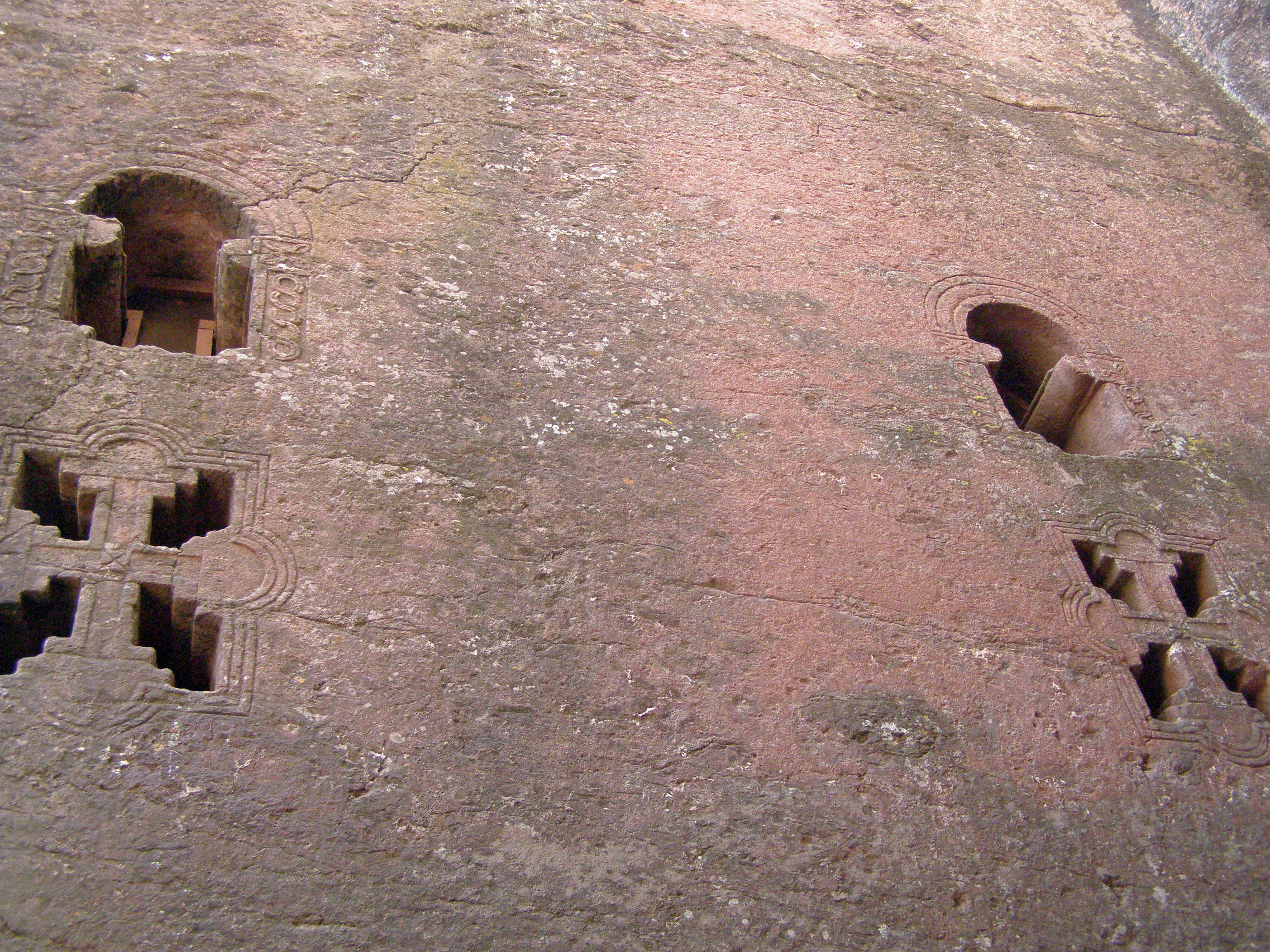 Ethiopie - Eglises rupestres de Lalibela - Biet Debre Sina (Détail)